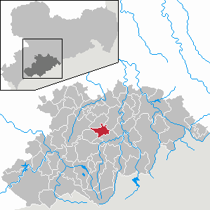 Ehrenfriedersdorf im Erzgebirgskreis, Sachsen